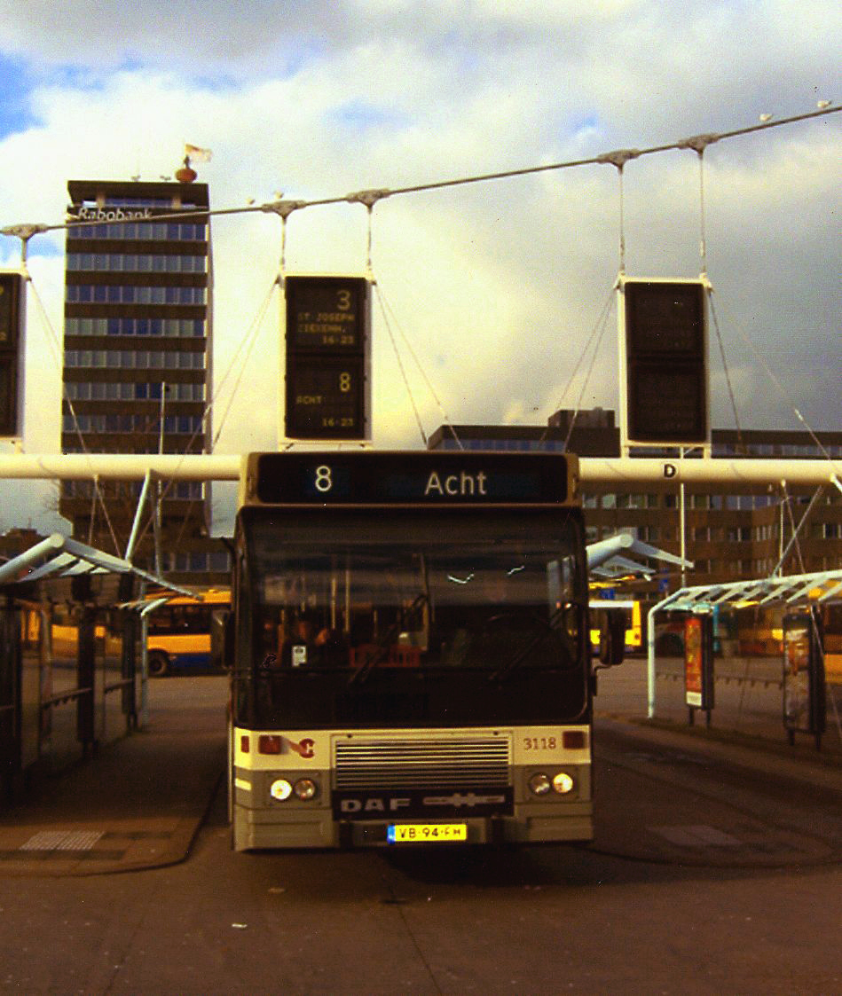 Buslijn 8 rijdt naar Acht op Eindhoven station